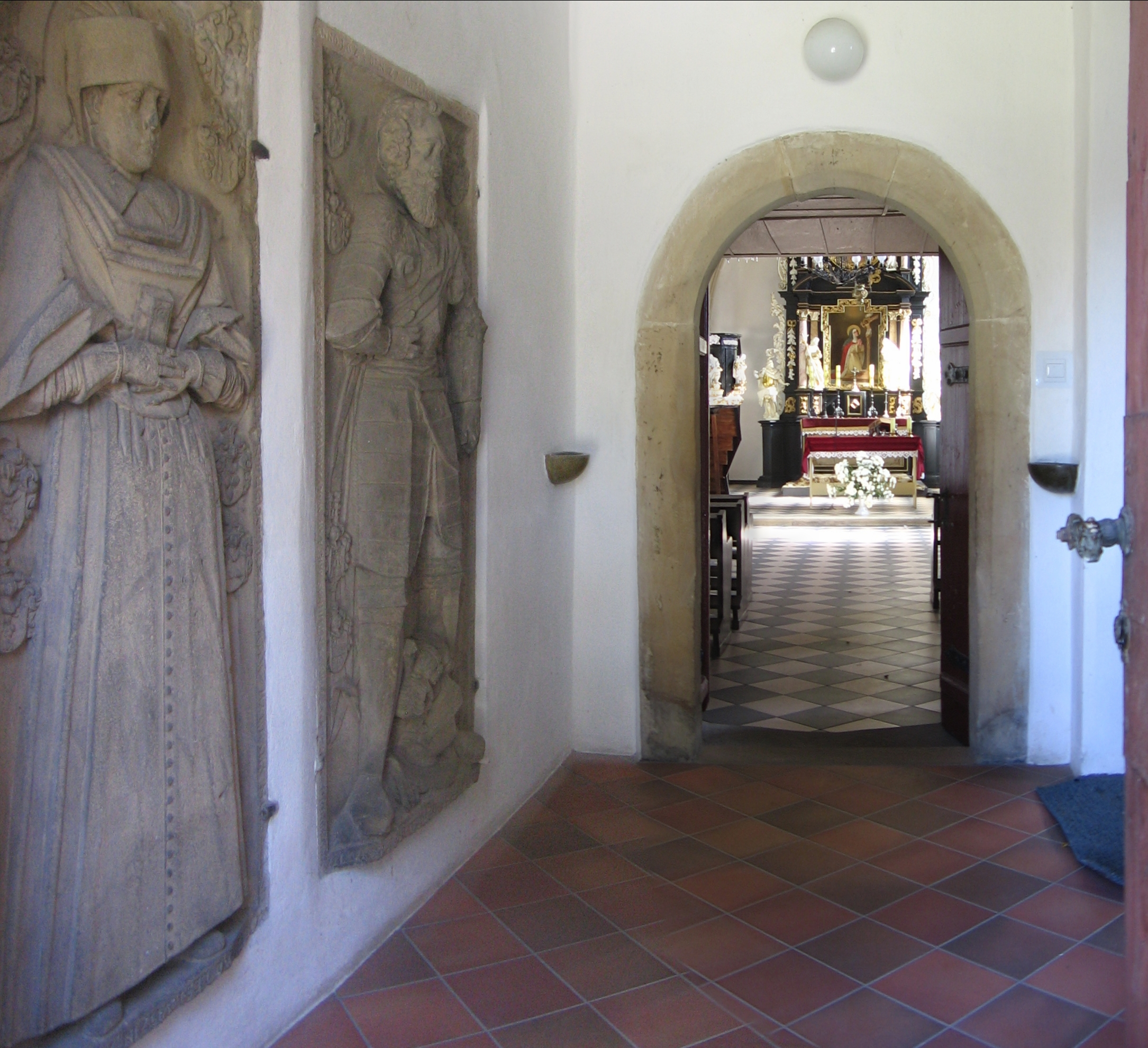 Jerzmanowo, kościół św. Jadwigi, wejście